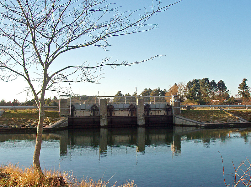 Norsminde Fjord ligger ca. 20 km syd for Århus, Århus Amt, Jylland, Denmark